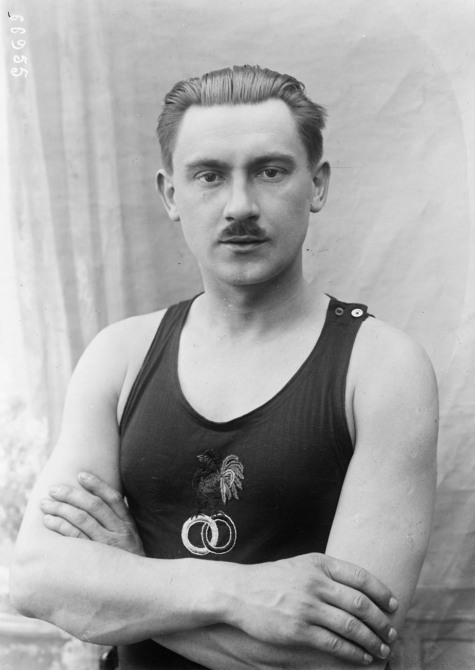 [Georges] Pouilley [champion de natation sur 100 m au championnat de Paris, le 26 juin 1921] : [photographie de presse] / [Agence Rol]